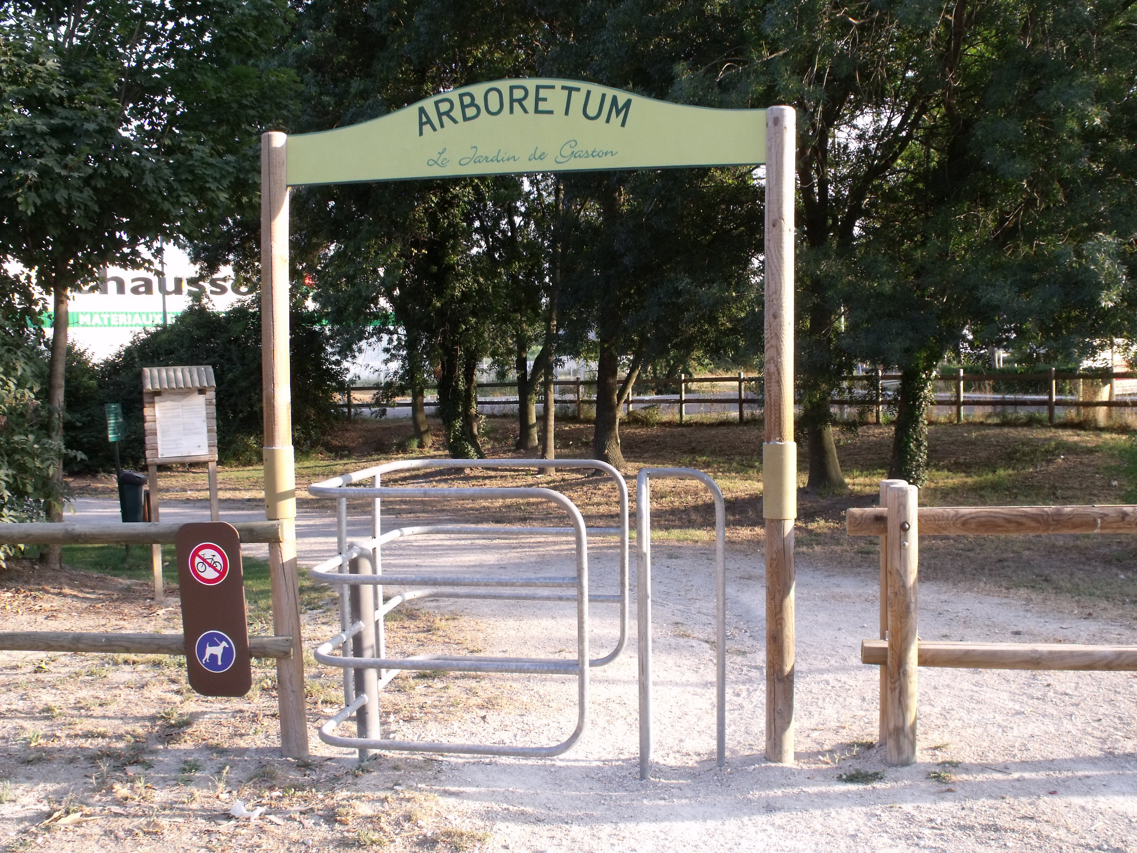 Entrée de l'arboretum Le Jardin de Gaston, à Saint-Martin-de-Crau (France, 13)